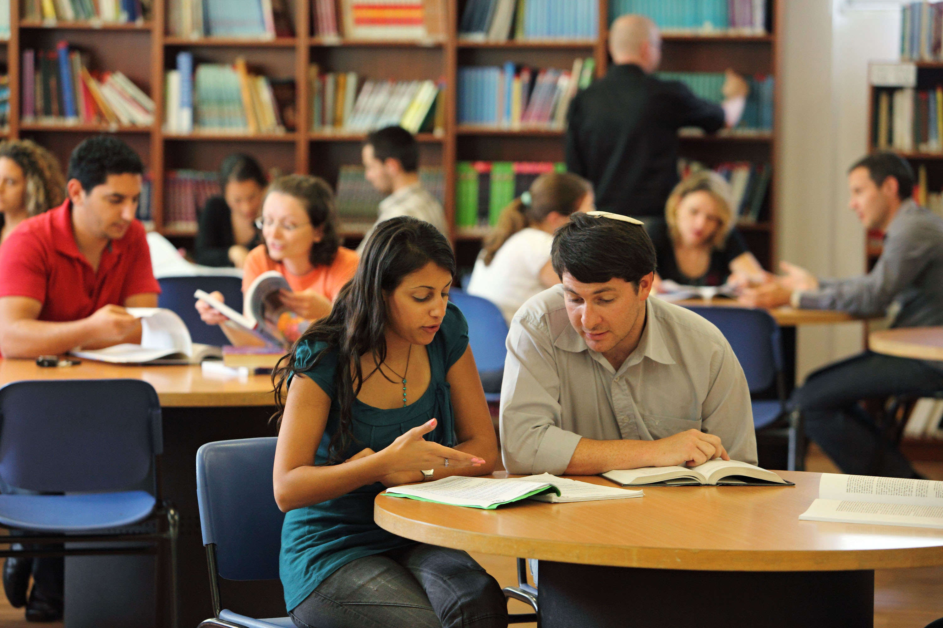 ספריה